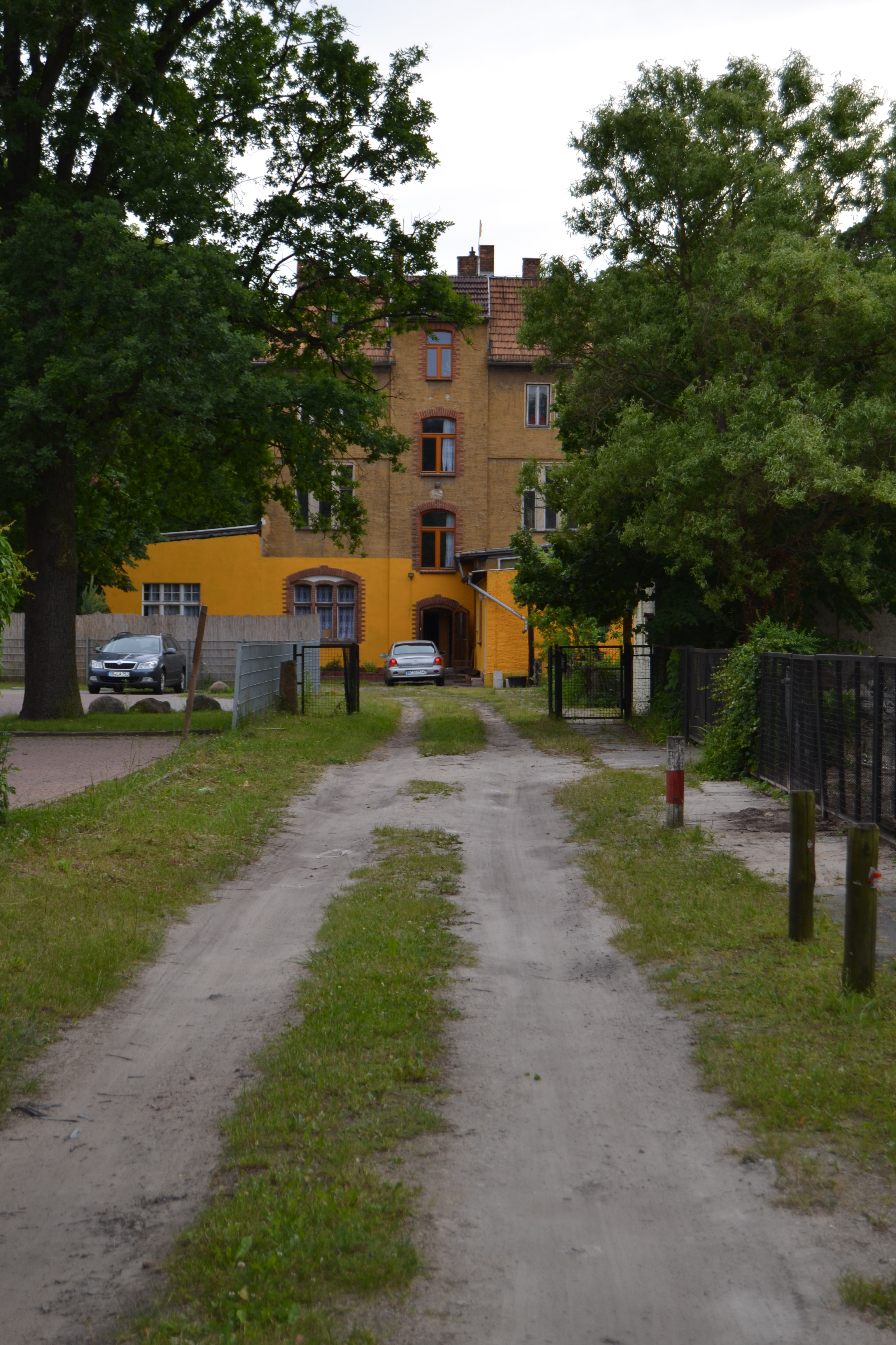 Buddhistisches Kloster und Meditationszentrum Schöneiche im früheren Hort der Bruno-H.-Bürgel-Oberschule und einer noch früheren Gaststätte.